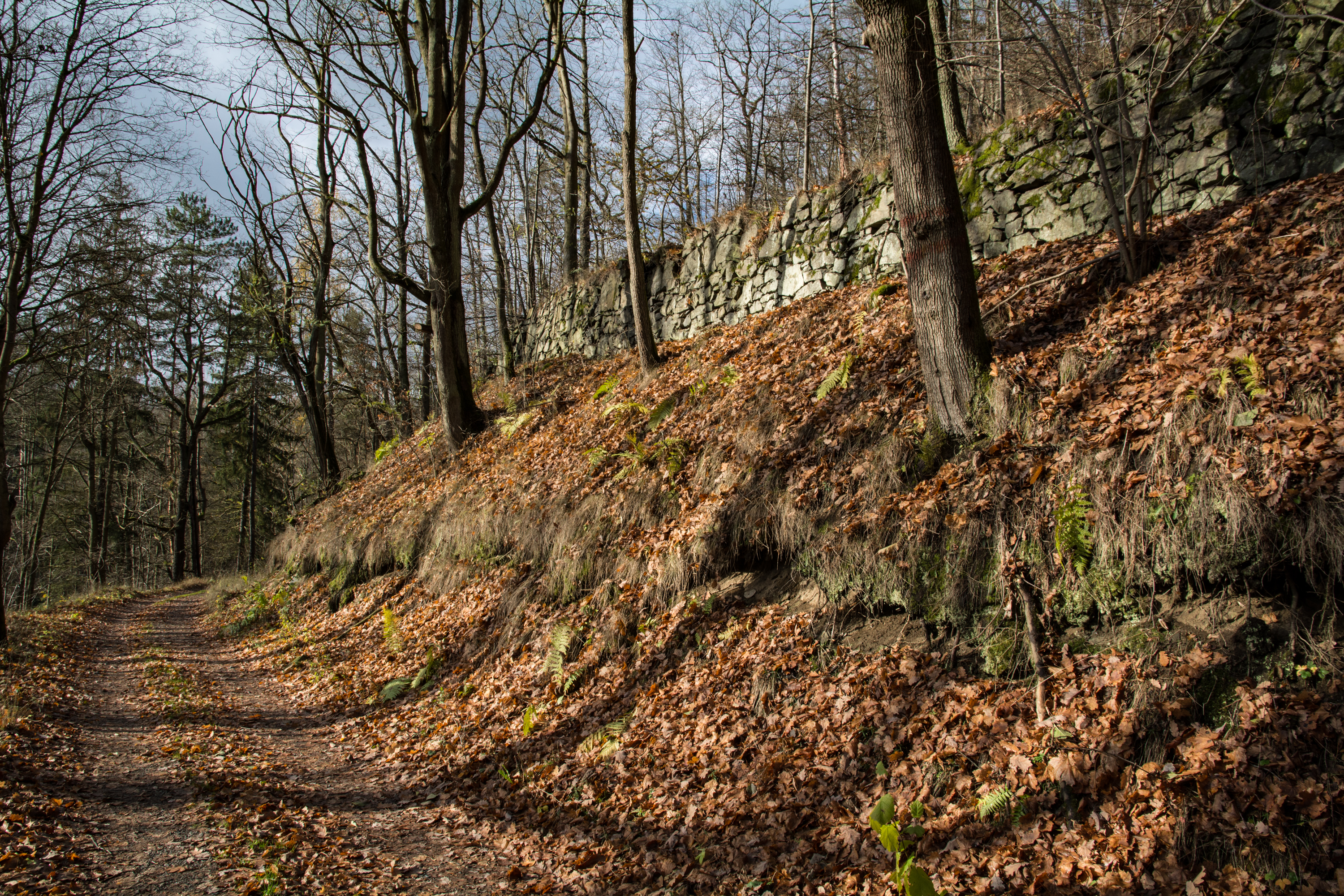 PR Pavlovická stráň cesta